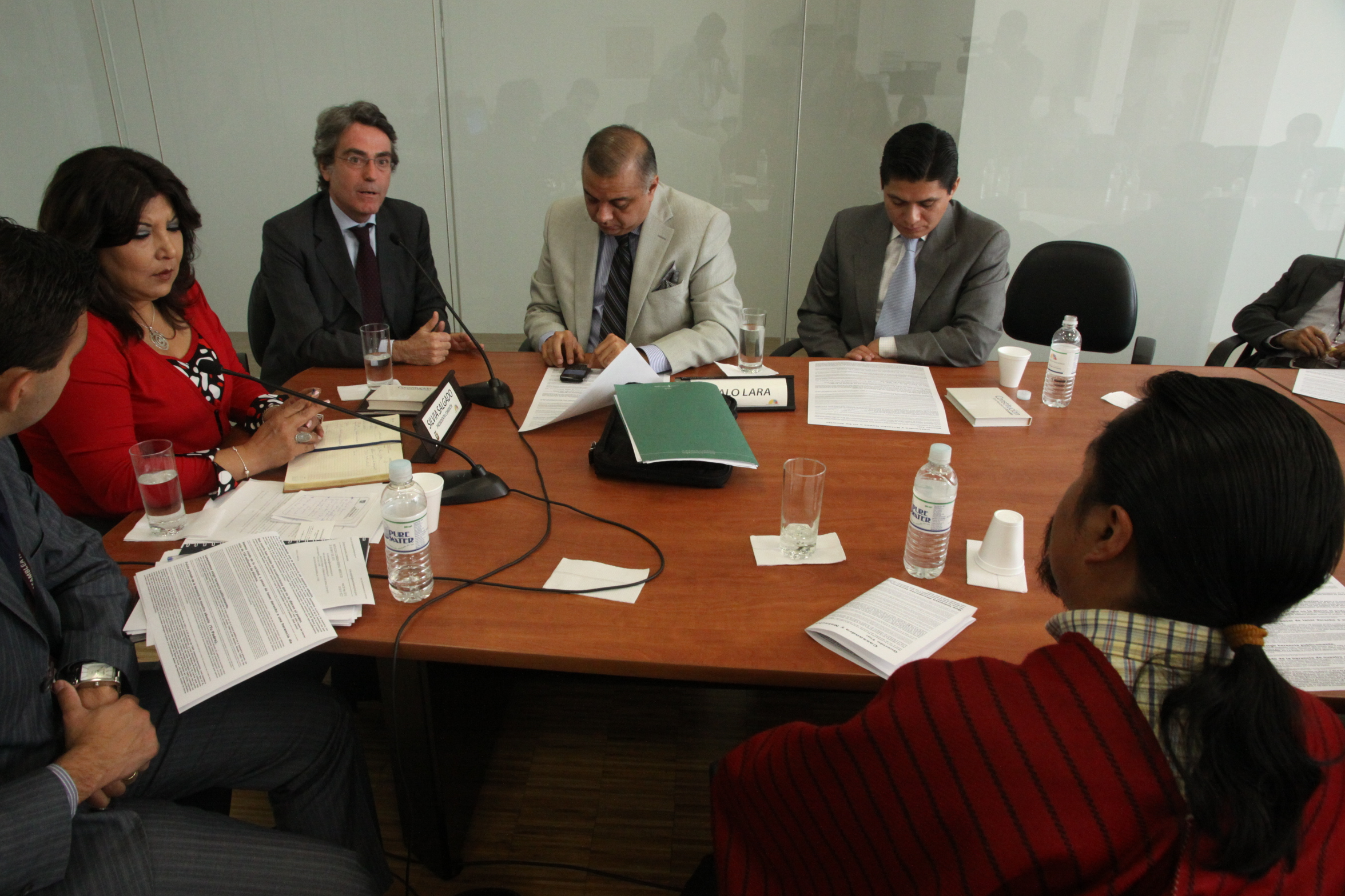 26 de Mayo de 2010